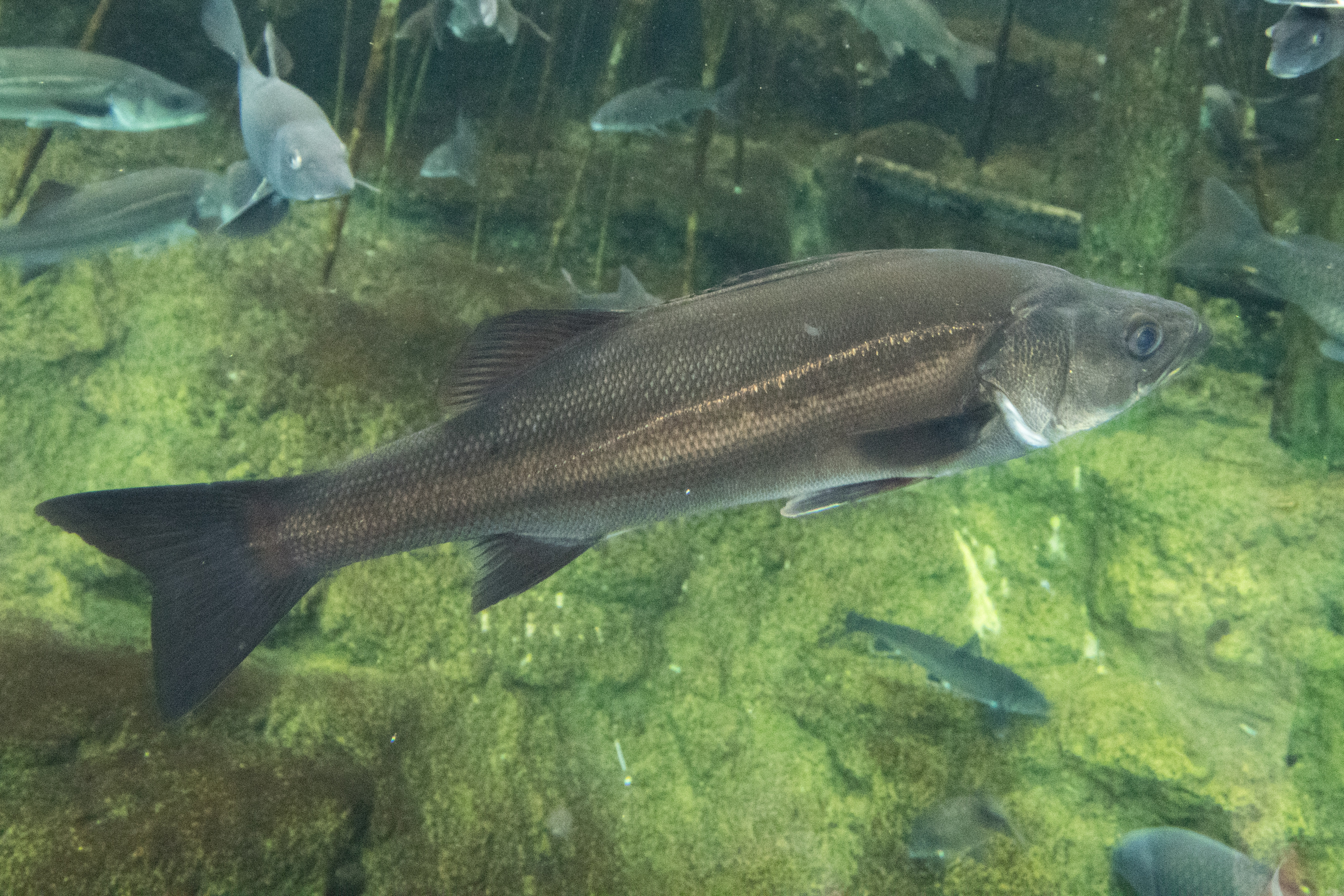 スズキ (学名:Lateolabrax japonicus)